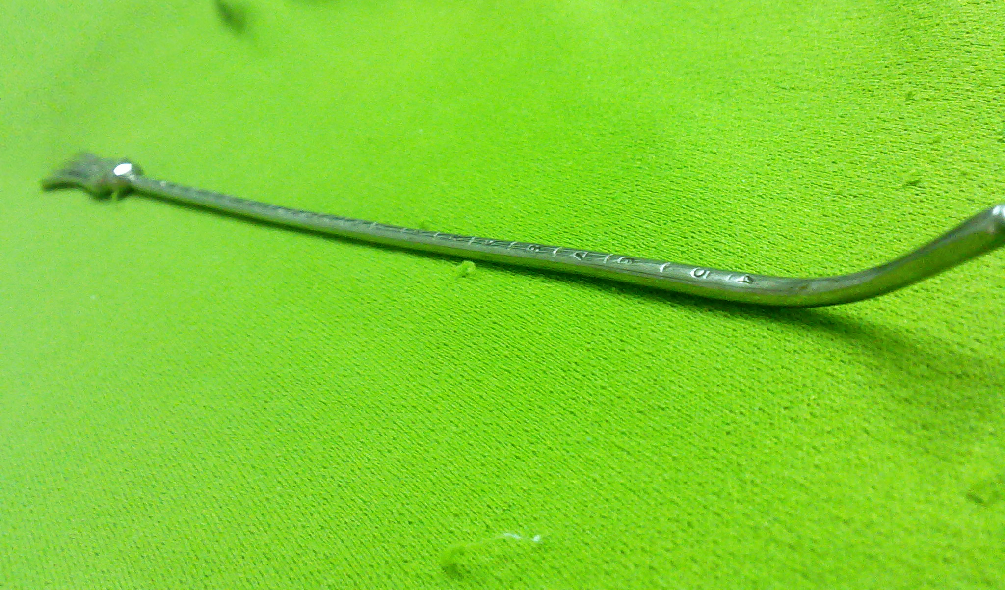 هیسترومتر : نام دیگر آن سوند رحمی است . این وسیله مدرج بوده و برای اندازه‌گیری عمق رحم از آن استفاده می‌کنند .